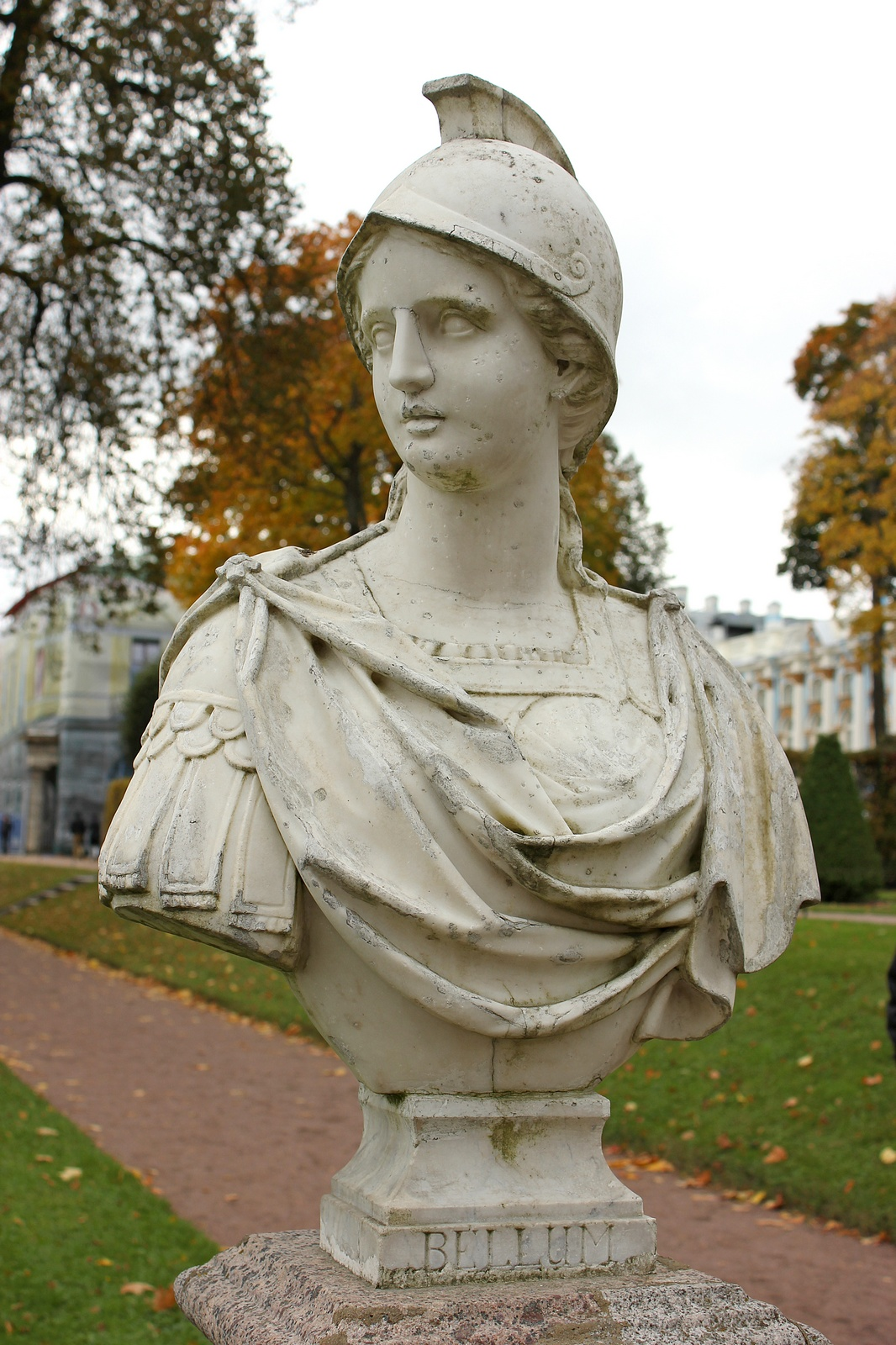 Бюст «Беллона» (Санкт-Петербург, Пушкин, партер)